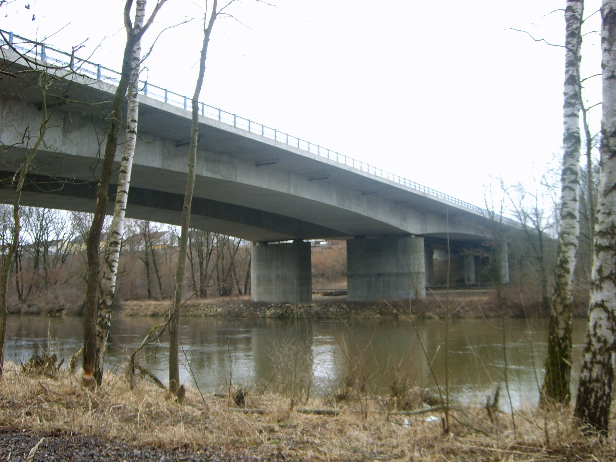 Donaubrücke Leipheim, km 105,139 Die Brücke wurde von der OBR Stuttgart 1935-1936 gebaut und im April 1945 gesprengt. Für den Wiederaufbau war die Autobahndirektion München zuständig. Bauwerk aus dem Jahr 2001. Die erste Donaubrücke wurde im zuge des Reichsautobahnbau im Jahr 1936 errichtet und im Krieg 1945 durch eine Sprengung stark zerstört. Wiederaufbau bis 1949. Abbruch für den Ausbau der A8 im Herbst 1999. 14.09.1937 Verkehrsfreigabe der Teilstrecke Ulm-Ost - Limbach zusammen mit der Donaubrücke bei Leipheim. Link zur historischen Aufnahme von 1938